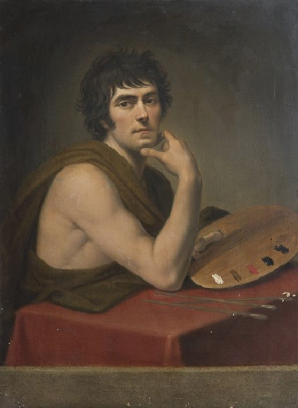 Autoritratto, olio su tela, 95 x 69 cm., coll. privata